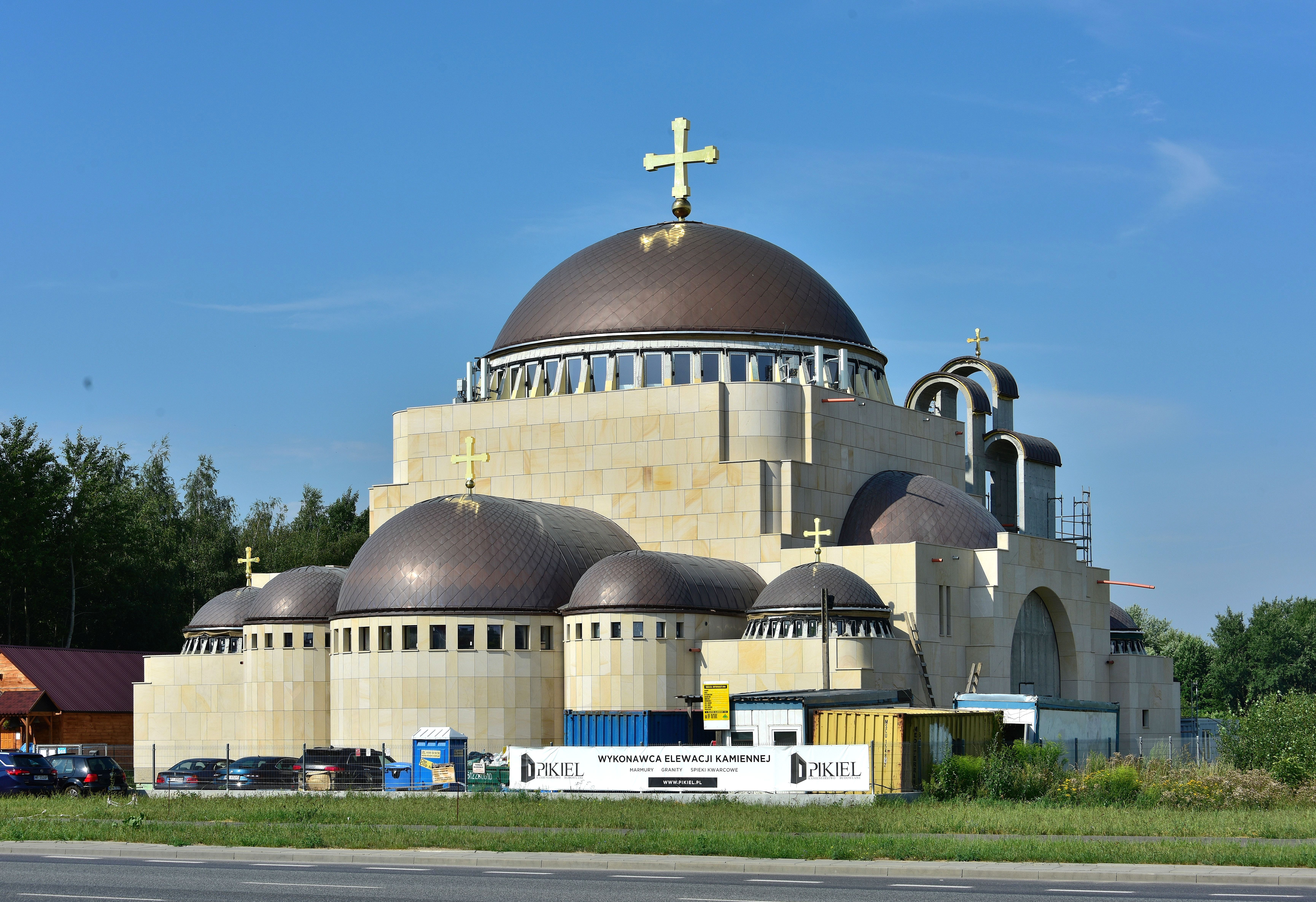 Cerkiew św. Sofii Mądrości Bożej przy ul. Puławskiej w Warszawie